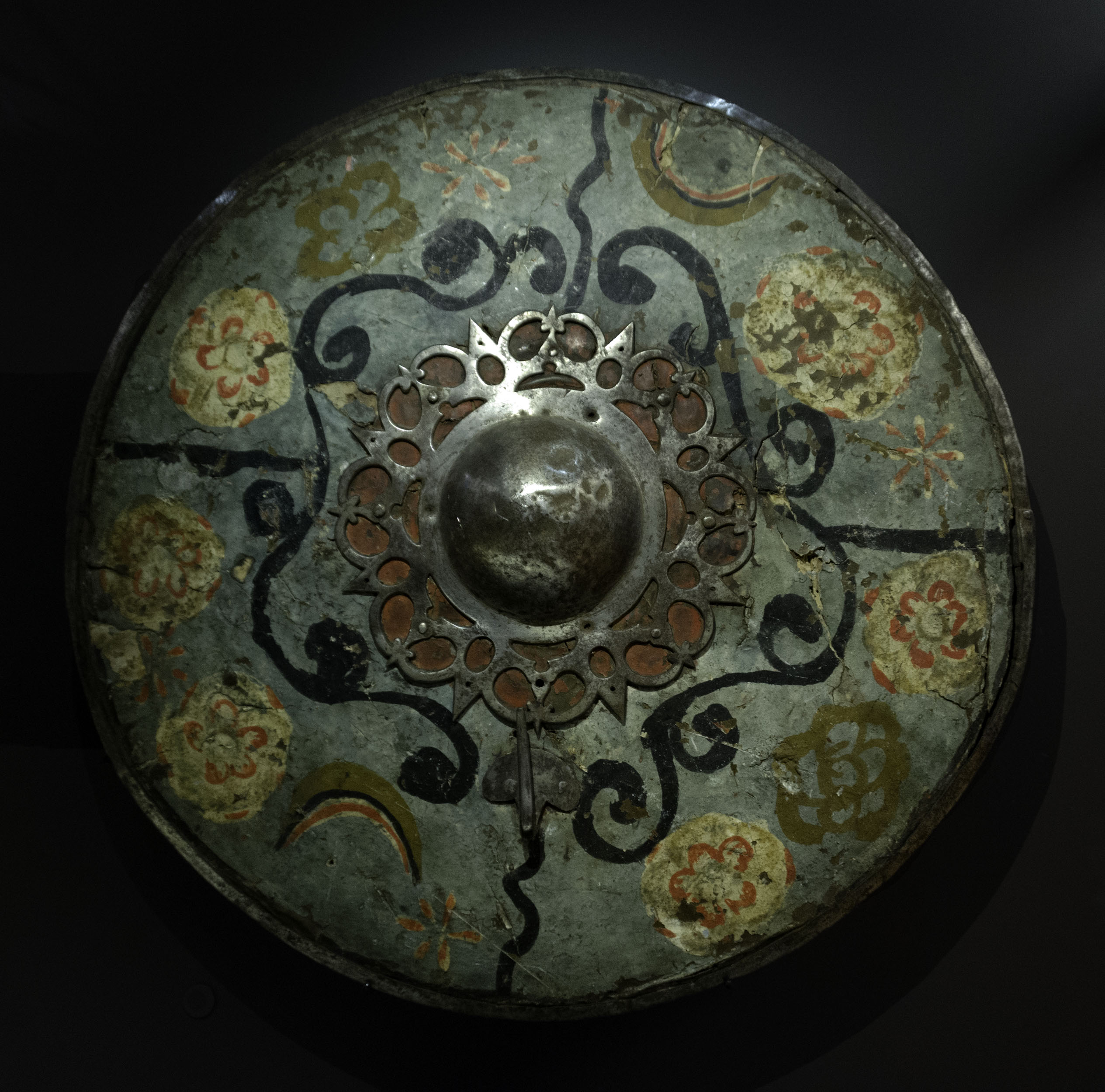 Construida en hierro y cuero se supone fue usada por los conquistadores del Perú en el siglo XVI. Museo Arqueológico Nacional, Madrid